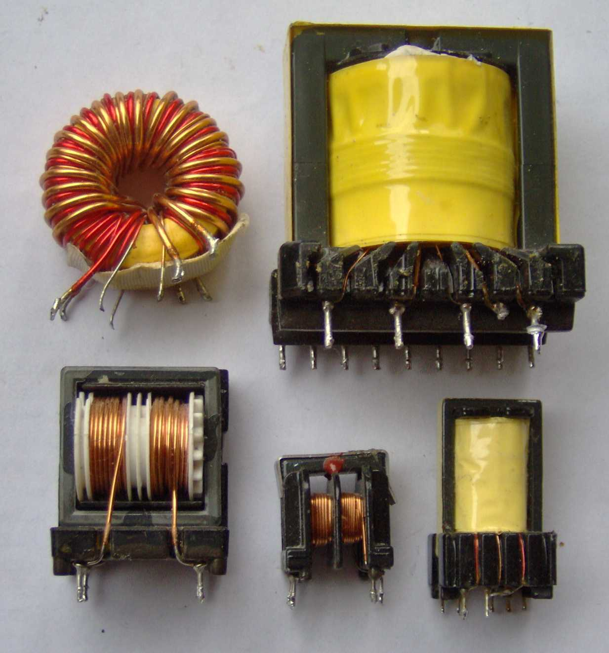 Electronic component - various small transformers